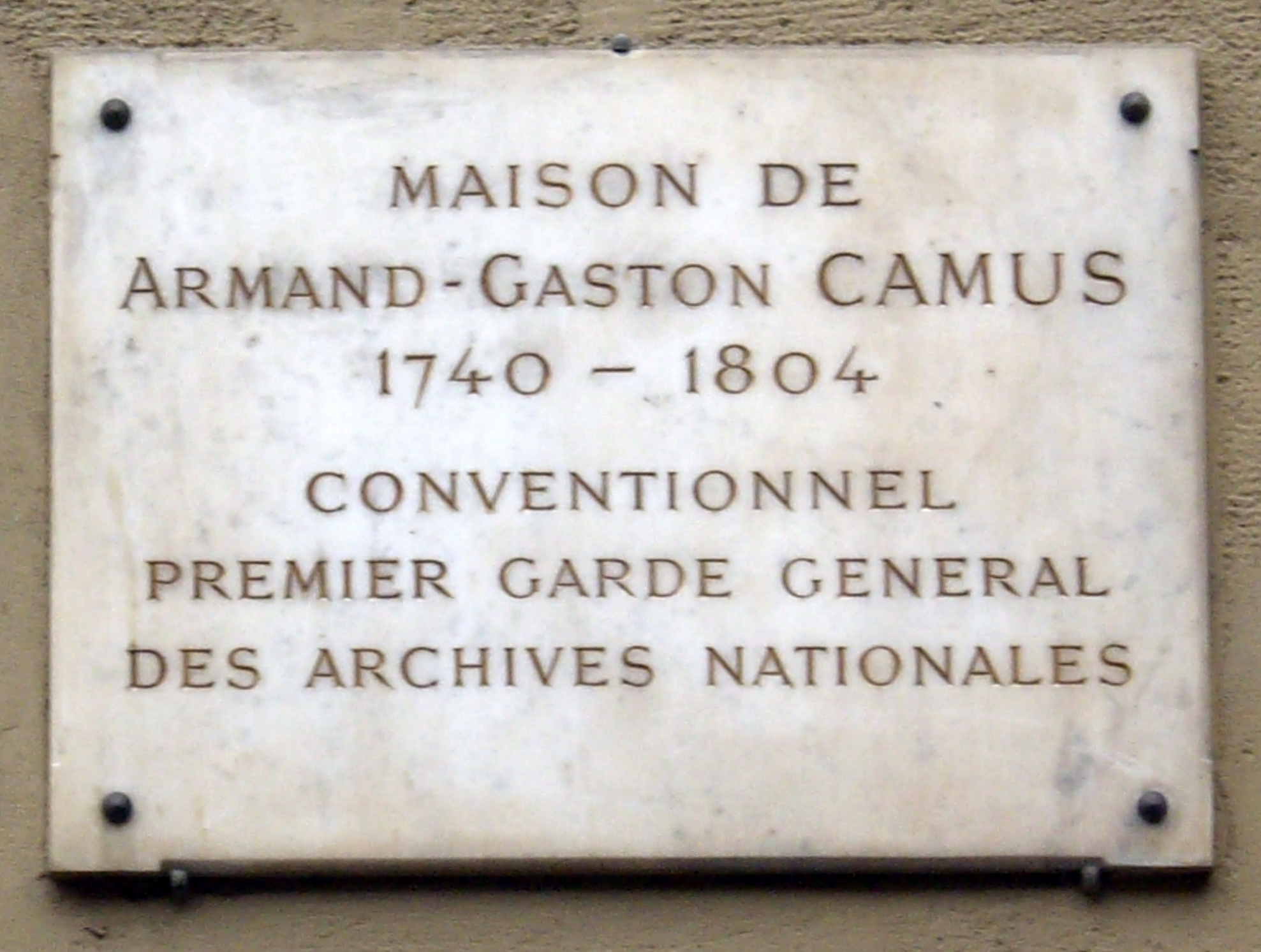 Plaque apposée au n° 17 de la rue Guénégaud, Paris 6e, sur la maison d'Armand-Gaston Camus (1740-1804), conventionnel, premier garde général des Archives nationales.